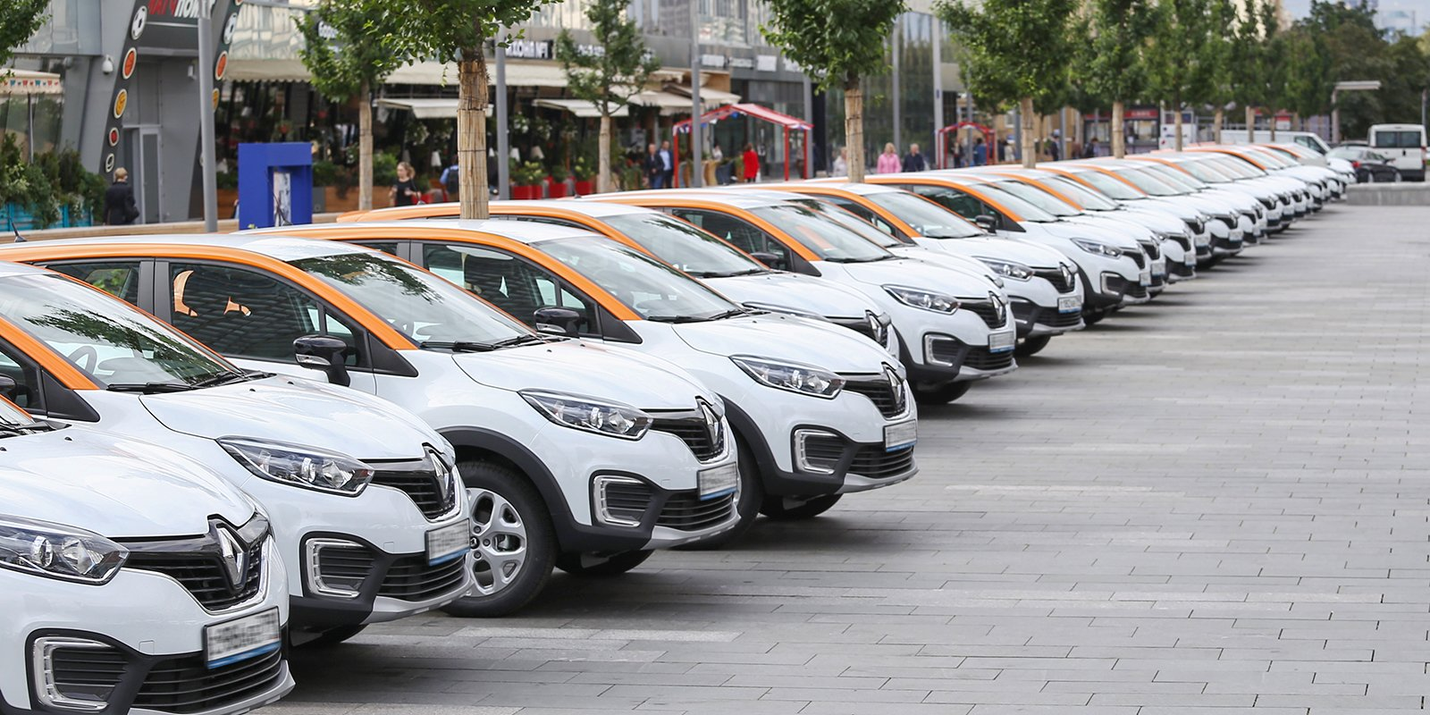 Каршеринг в Москве (Easy Ride)